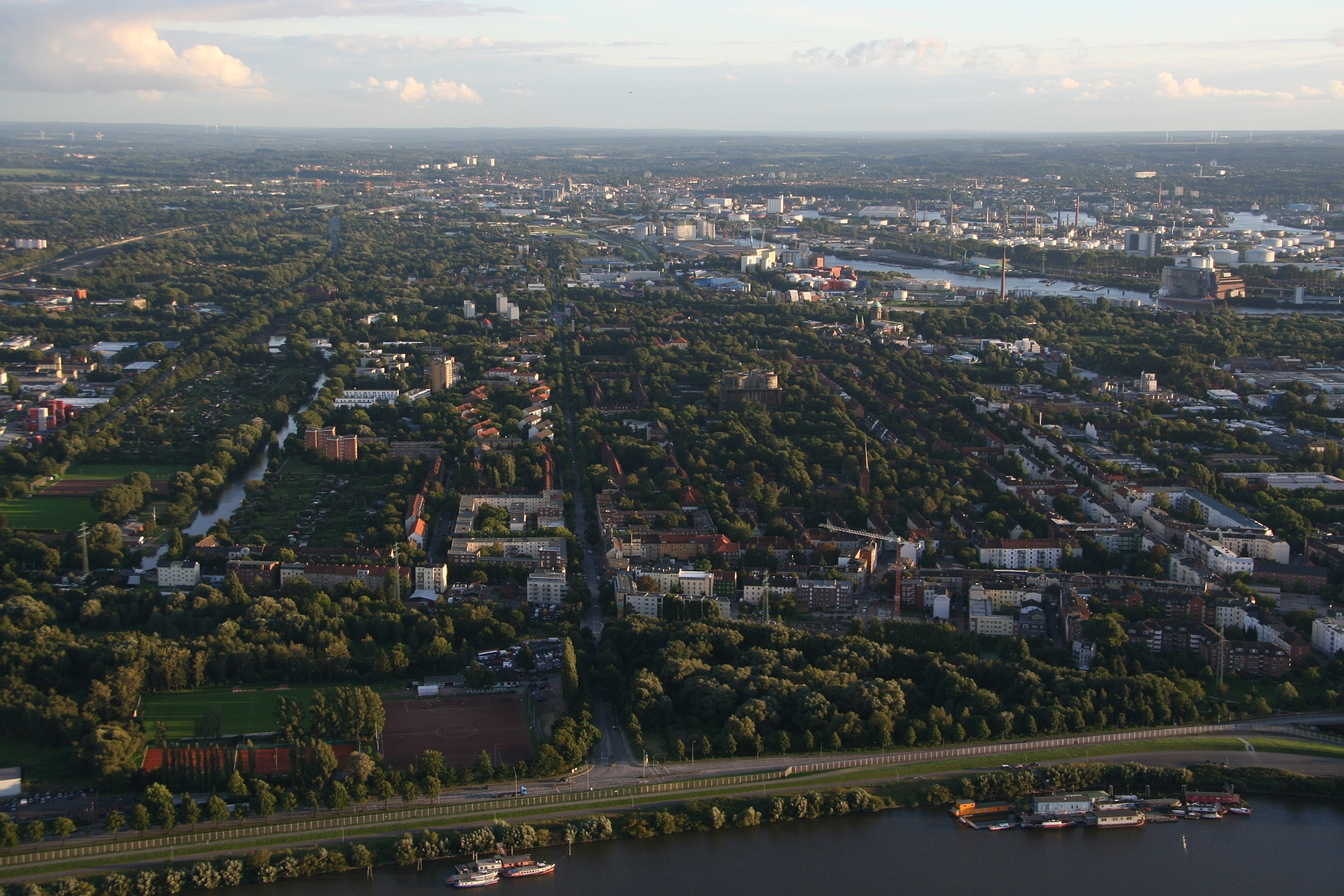 Wilhelmsburg